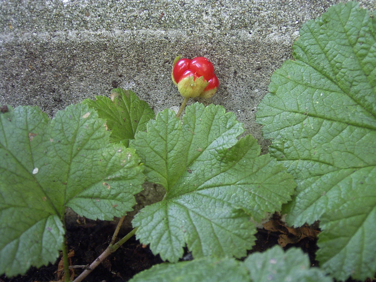 Rubus chamaemorus Beere, weibliche Pflanze, Sorte 'Apolto'.